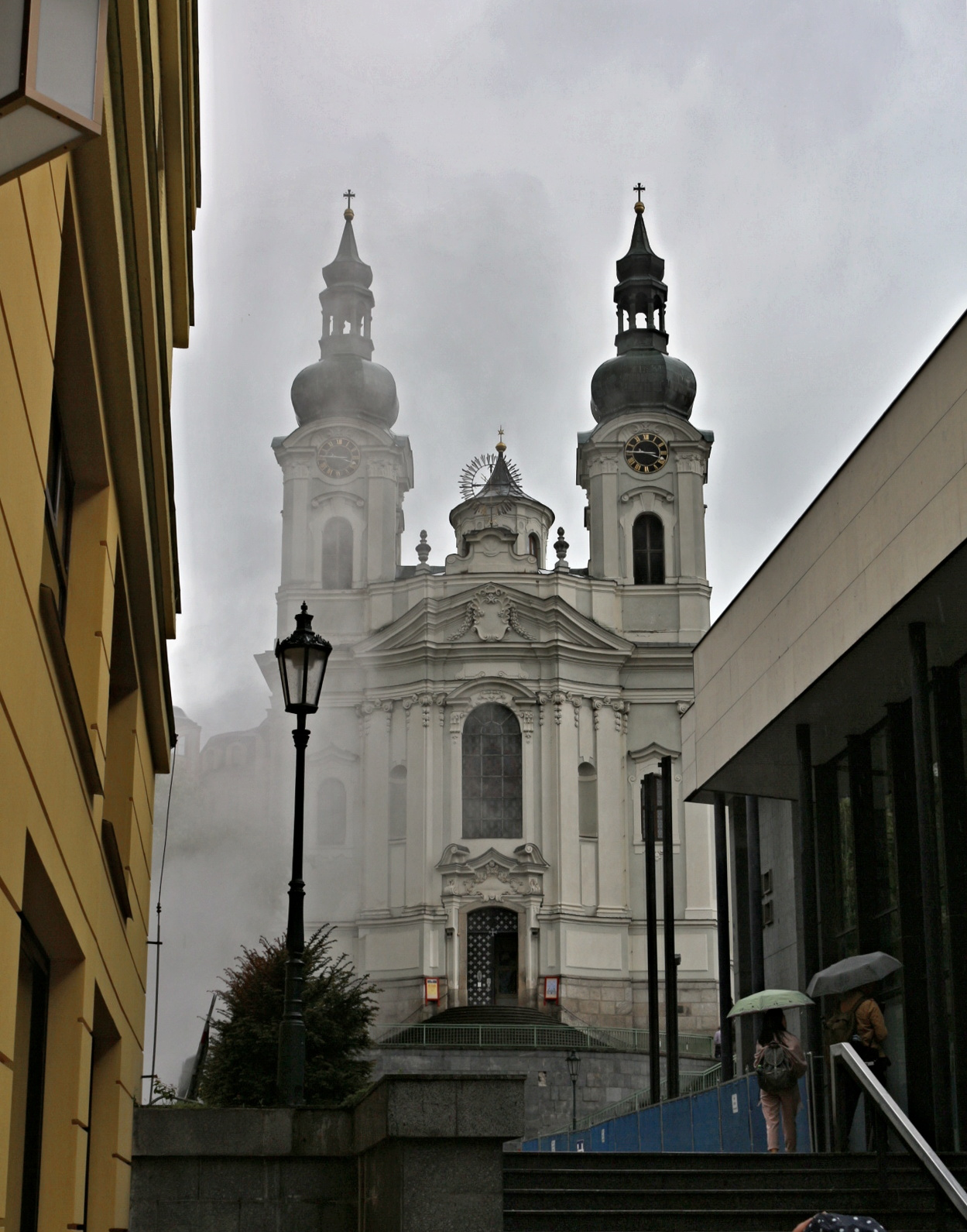 Kostel svaté Máří Magdaleny v Karlových Varech